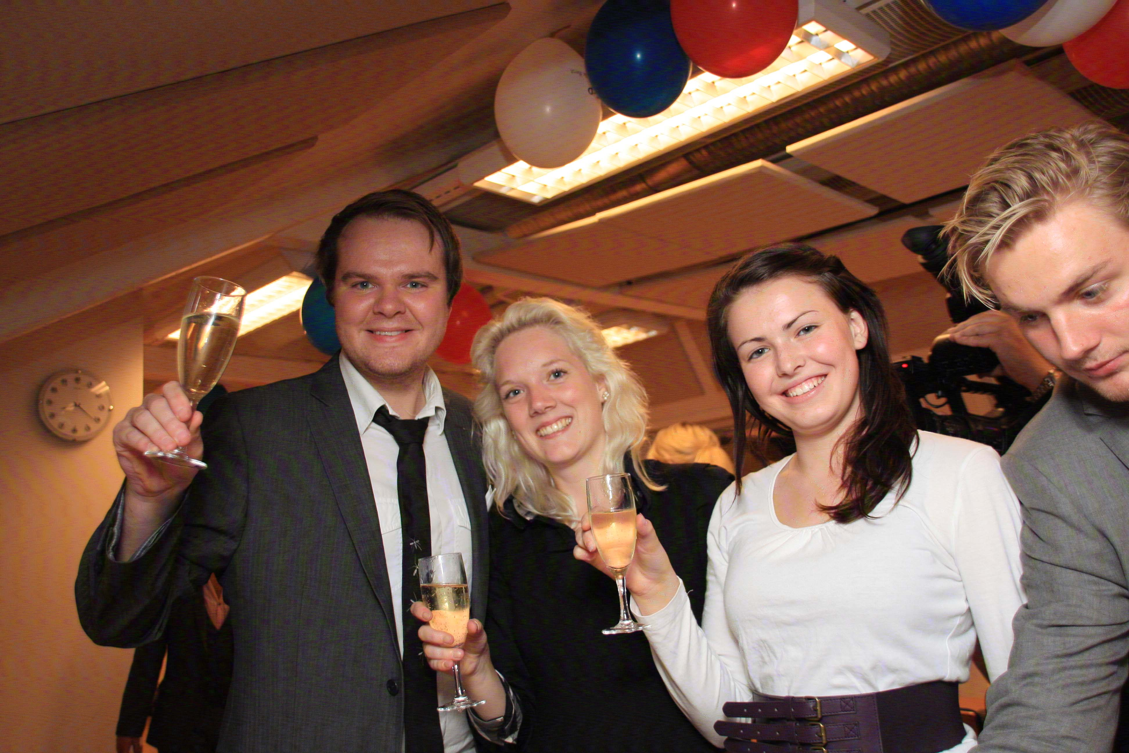 Valgvake for skolevalgseieren i 2009.